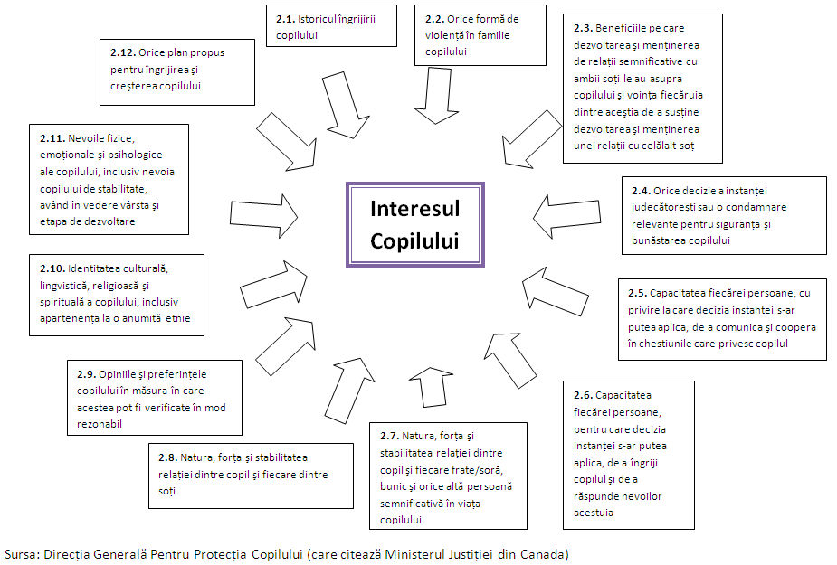 DeciziileJudecatorestiSiInteresulSuperiorAlCopilului confirm cu Directia pentru protectia minorilor, lkegea 272 per 2004 (preluate dupa modelul canadian). Vezi si